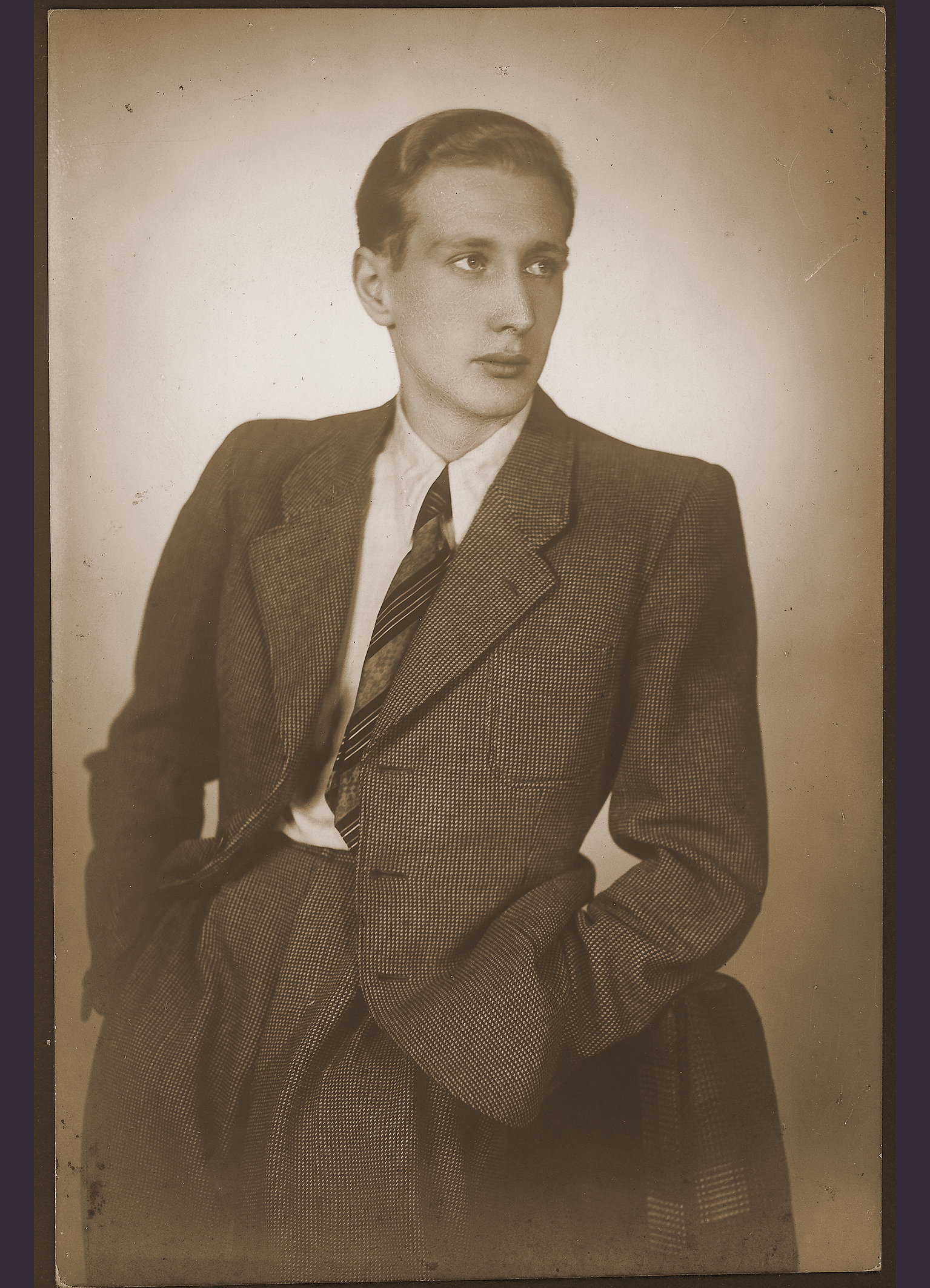 Jan Antoni Strzelecki - zdjęcie maturalne